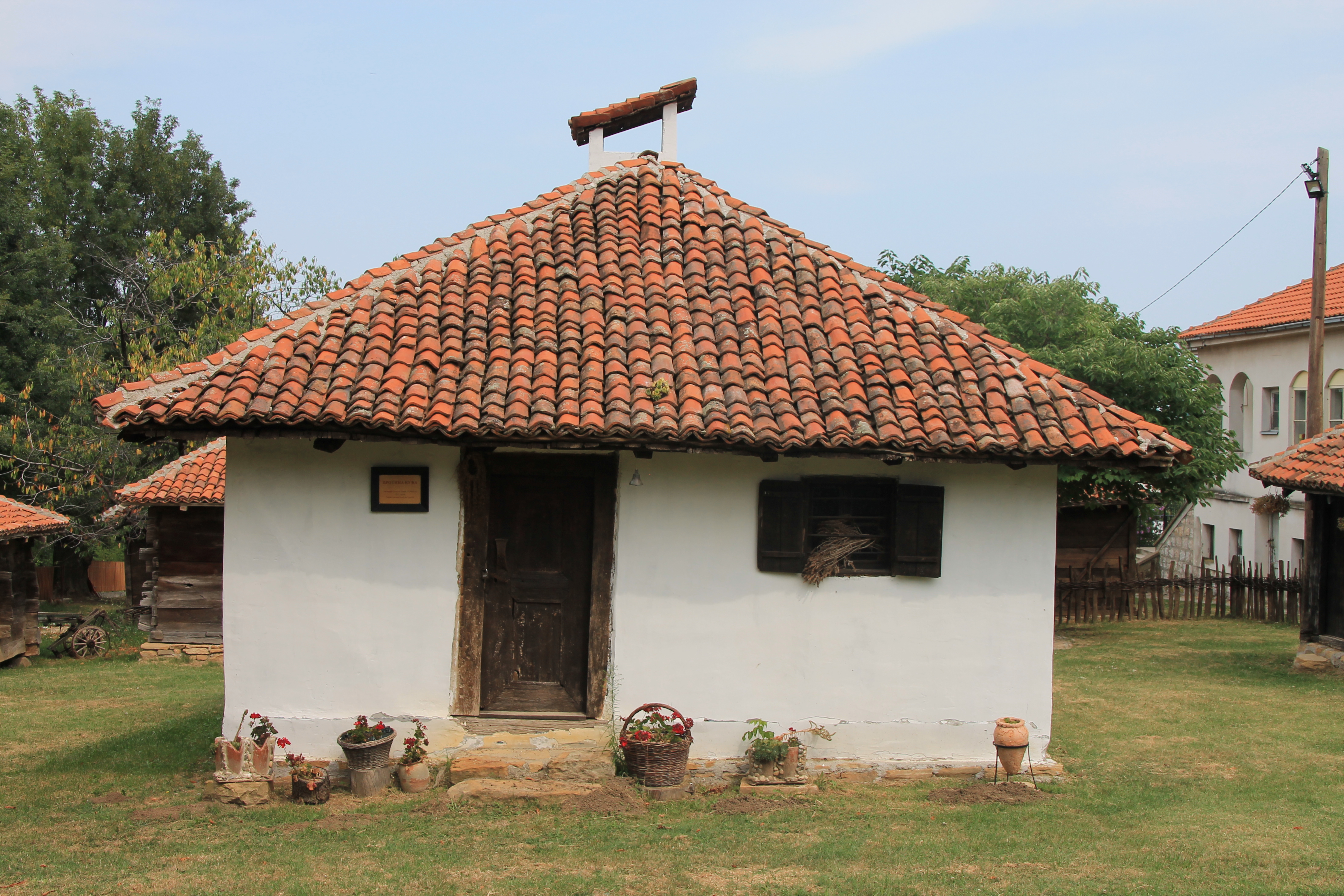 Etno selo Čumić